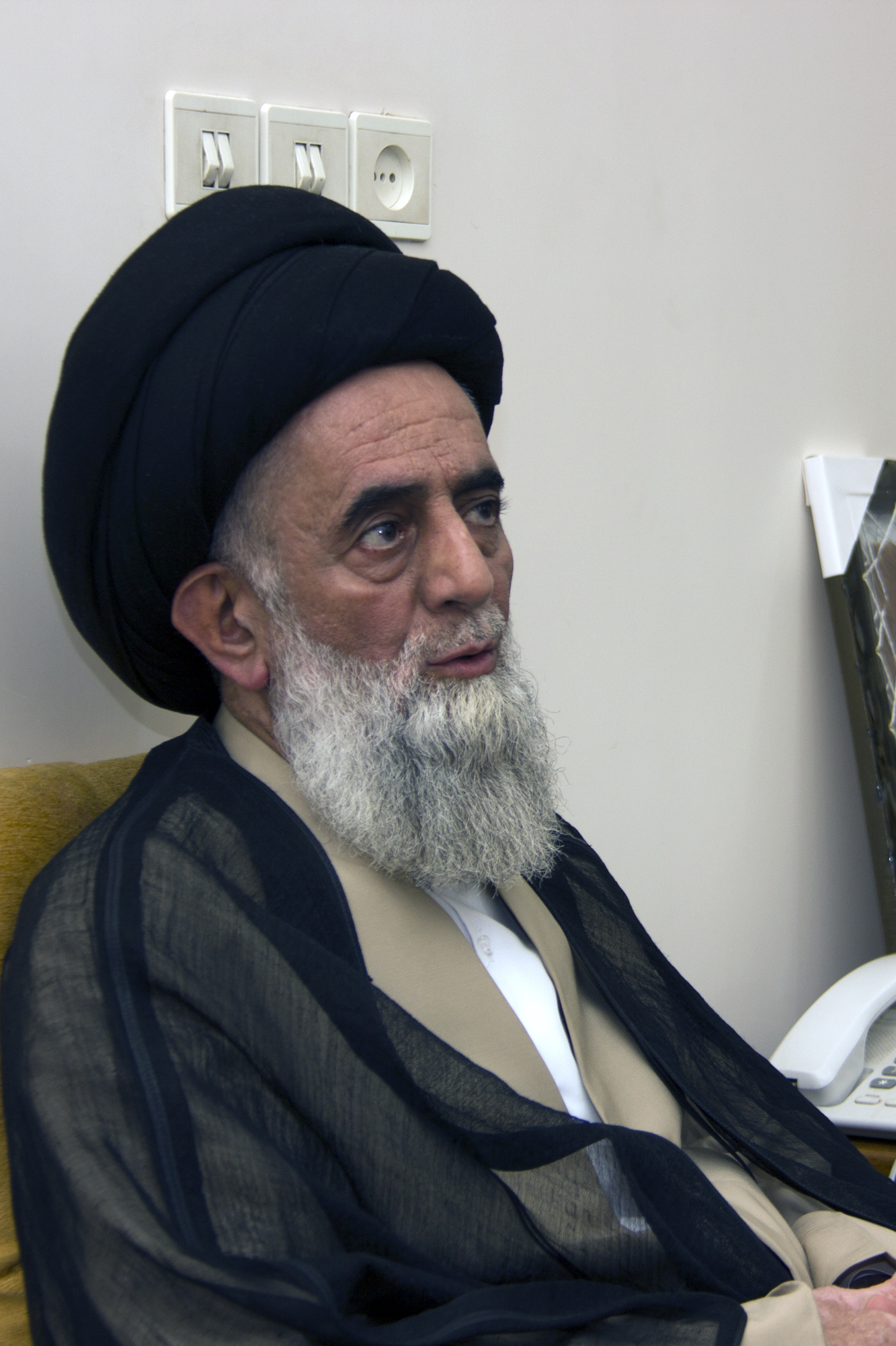 میر سید محمد یثربی (زادهٔ ۱۳۳۳ - قم) فرزند سید مهدی؛ مجتهد شیعی ایرانی، رئیس حوزه علمیه کاشان و محقق فقه و اصول، تفسیر، اخلاق و عرفان می‌باشد. پدر وی اولین امام جمعه کاشان در زمان انقلاب بوده و عمویش میر سید علی یثربی کاشانی از اساتید مطرح حوزه و از جمله استاد سید روح‌الله خمینی بوده است. سید محمد در ۵ سالگی همراه با خانواده به کاشان آمد. وی از سال ۱۳۵۴ تحصیلات عالی را در قم نزد مرتضی حائری و مراجعی مانند وحید خراسانی، سید محمد روحانی، محمدرضا گلپایگانی خواند و در درس فلسفه (اسفار) آیت‌الله صدر، مطهری و جوادی آملی شرکت کرد. یثربی از سال ۱۳۷۸ تدریس خارج فقه و اصول را آغاز کرد و در سال ۱۳۶۹ «مؤسسه علمی تحقیقاتی علامه مجدد وحید بهبهانی» را جهت تحقیق و نشر علوم اسلامی تأسیس کرد. این مؤسسه با بیش از پنج هزار جلد کتاب و رسائل متعدد در حوزه علمیه فعال است.